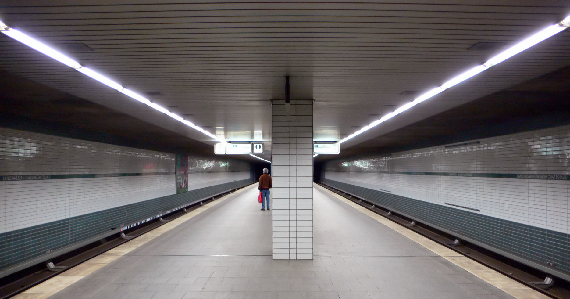 U-Bahnhof Gemeinschaftshaus der U-Bahn Nürnberg, Bahnsteigebene, Blick von Südosten